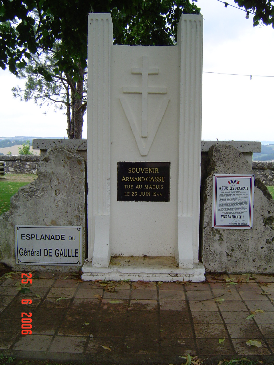 Stele à la mémoire d'Armand CASSE, place du foirail à Puymirol